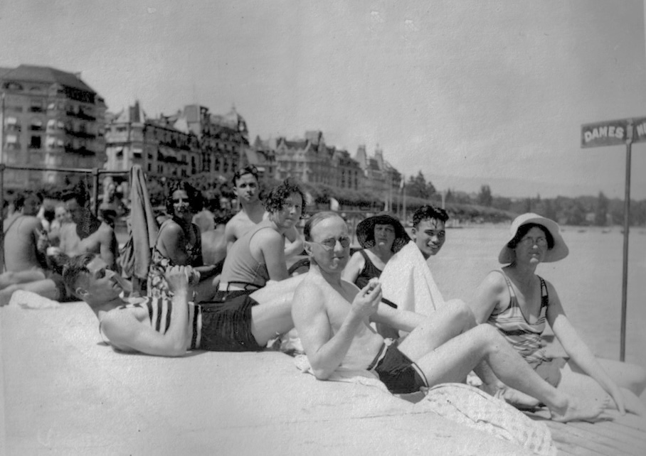 Vue d'un groupe de baigneurs sur la jetée des Bains des Pâquis à Genève en 1930. L'homme au premier plan et la femme tout à droite sont Bertram (1892-1973) et Irene (1891-1981) Pickard, secrétaires du Geneva Quaker Center de 1926 à 1948 (avec une absence pendant la guerre), avec un groupe d'hôtes du Quaker Hostel.